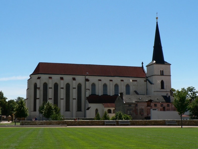 Kostel Povýšení sv. Kříže.